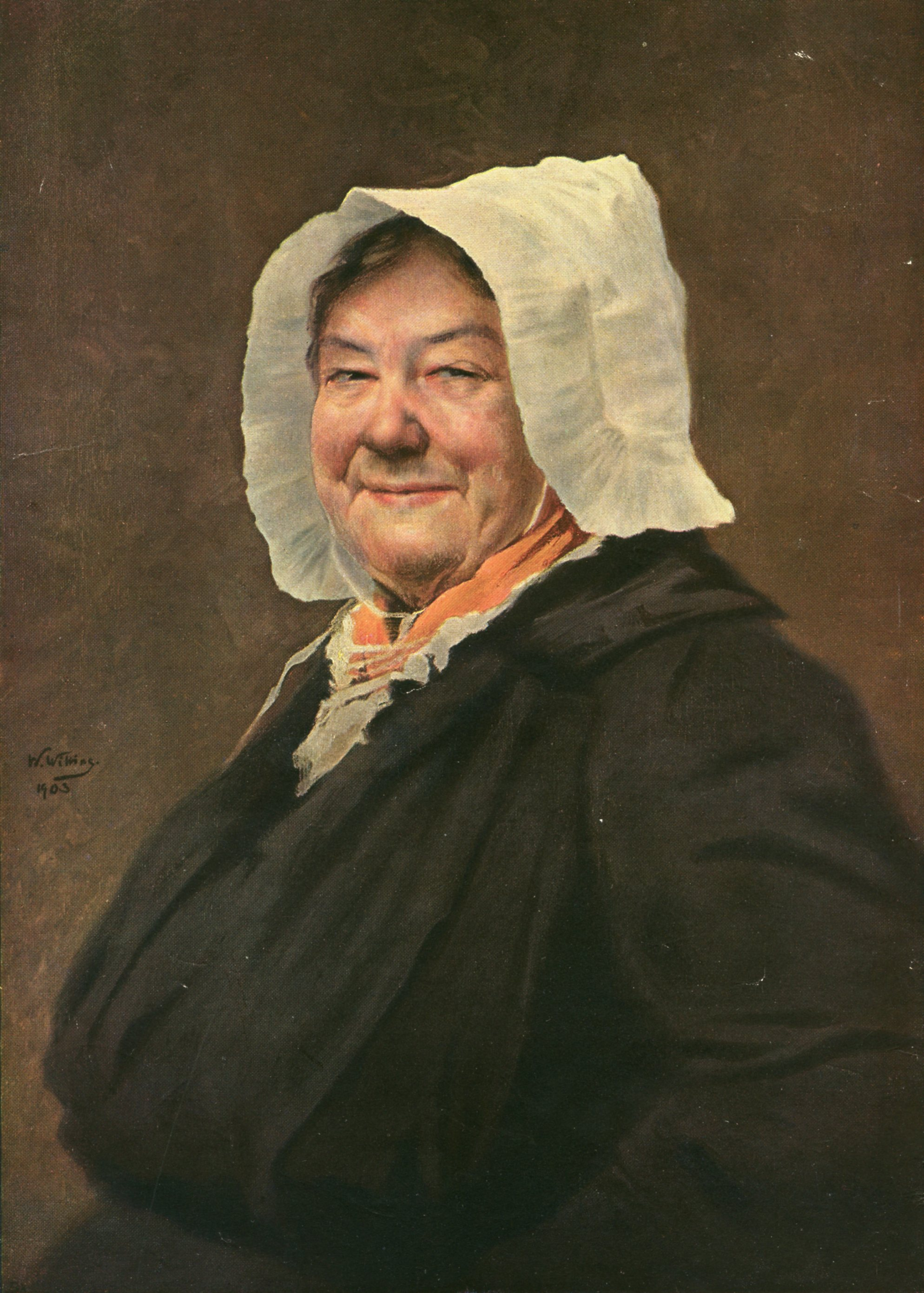 Gemälde "Die Marktfrau" von Walter Witting aus dem jahr 1903